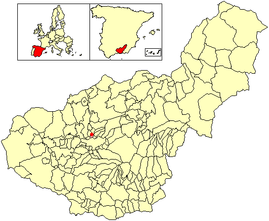 Situación de la localidad de Los Olivos (oficialmente Urbanización Los Olivos, en el municipio de Pulianas) respecto a la provincia de Granada, en España.